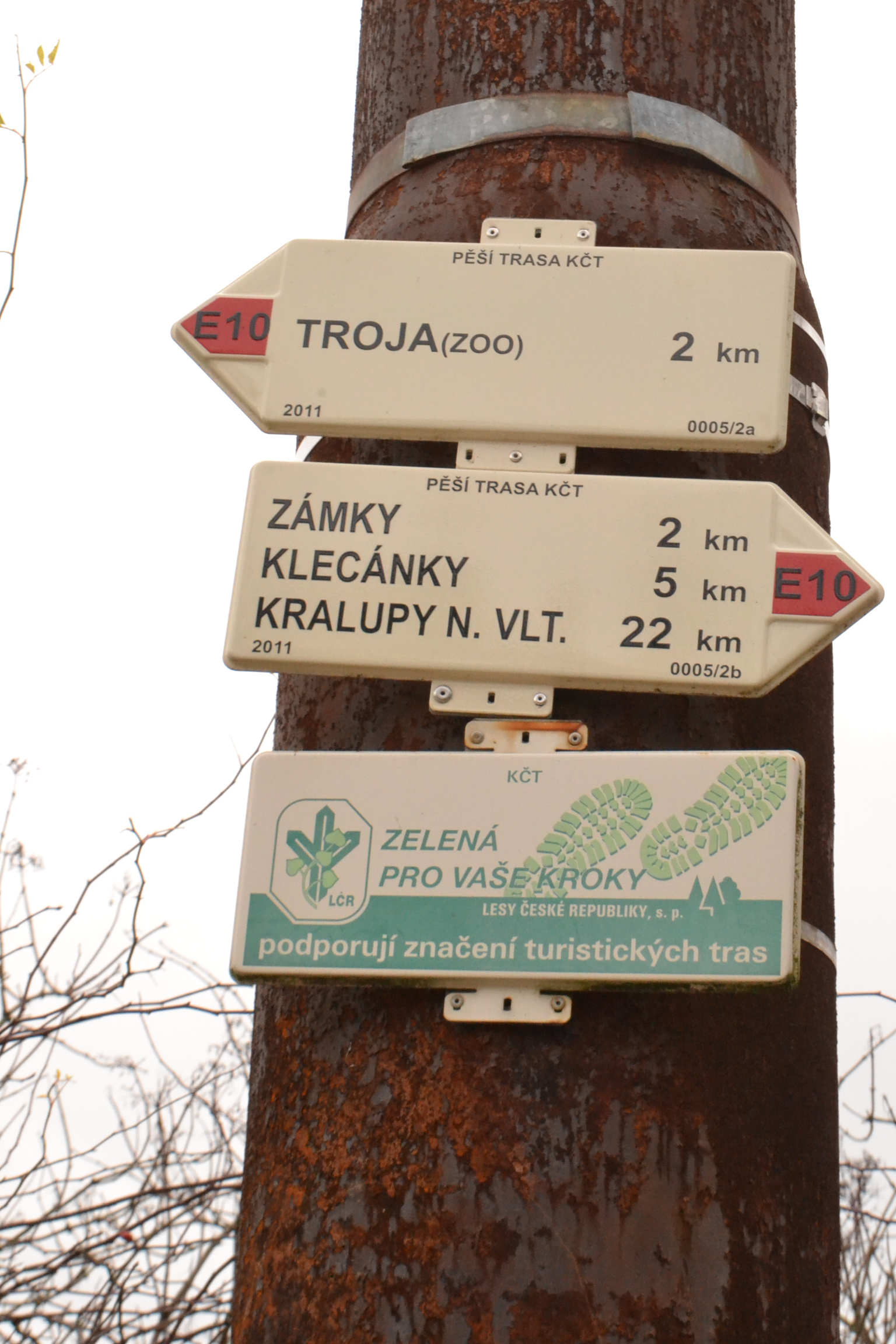 Značení turistických tras - směr Troja, Zámky, Klecánky a Kralupy n. Vltavou